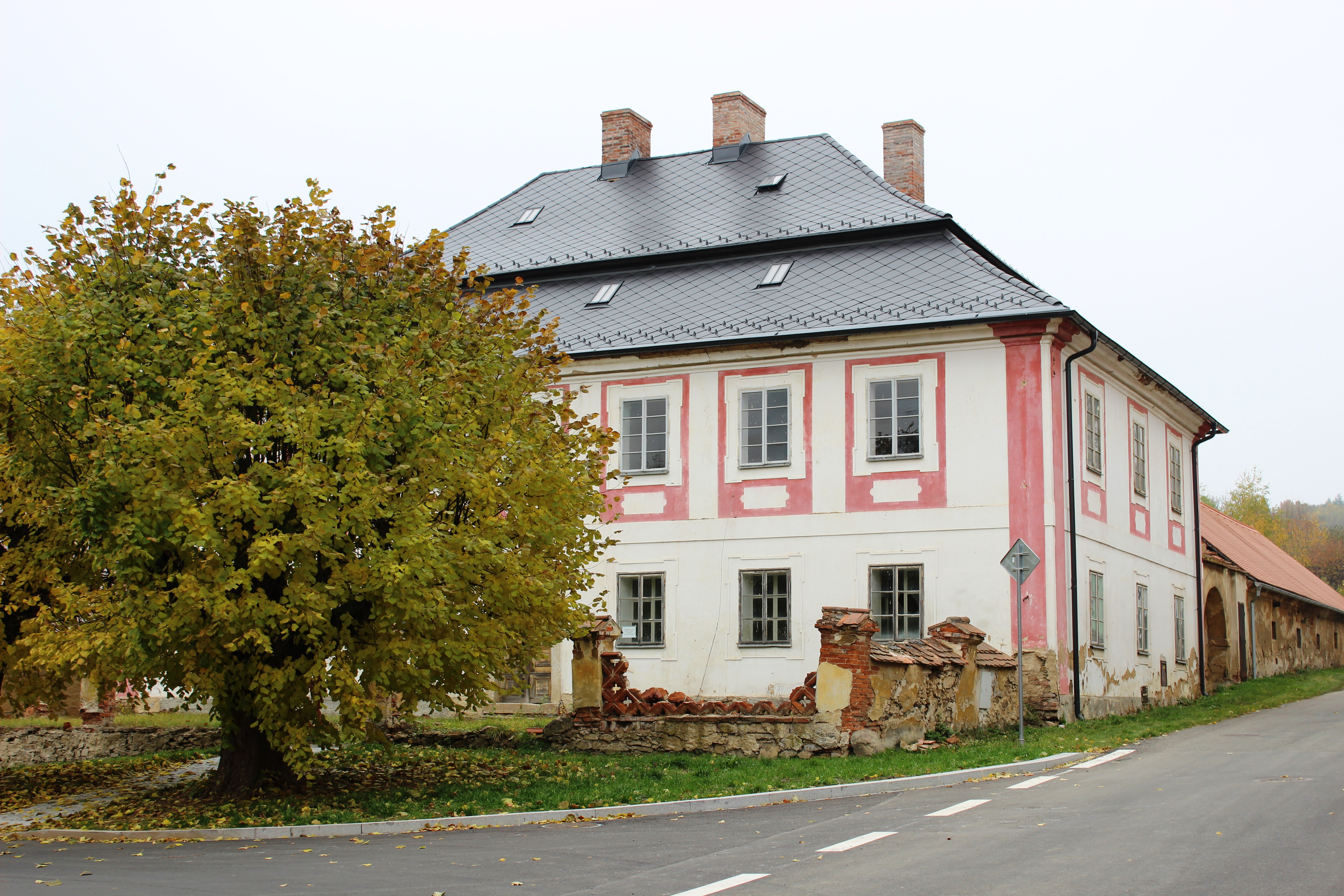 Chudenice v okrese Klatovy. Česká republika.